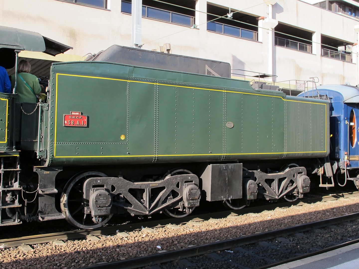 Le tender 38 A 1 de la 231 K 8 en gare de Paris-Lyon le 15 septembre 2013.